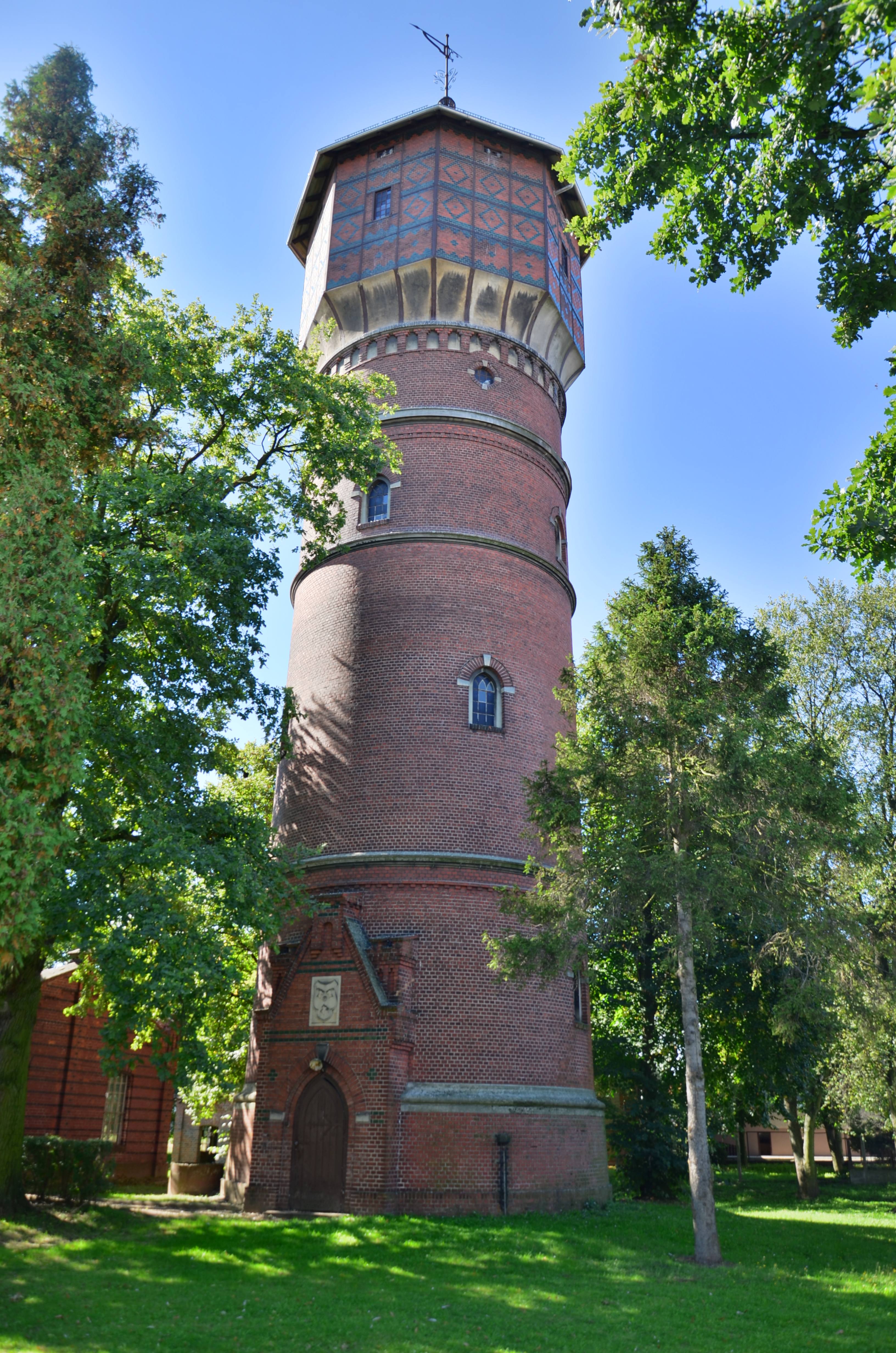 zespół wodociągów miejskich - wieża ciśnień, - budynek pompowni, - budynek biurowy Kędzierzyn-Koźle ul. Filtrowa 14:, Kędzierzyn-Koźle 02.1982.